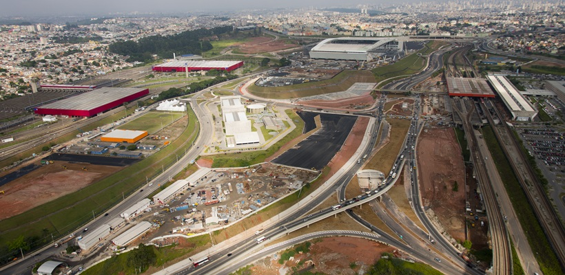 Vista aérea da região de Itaquera, São Paulo, com a Arena Corinthians ao fundo